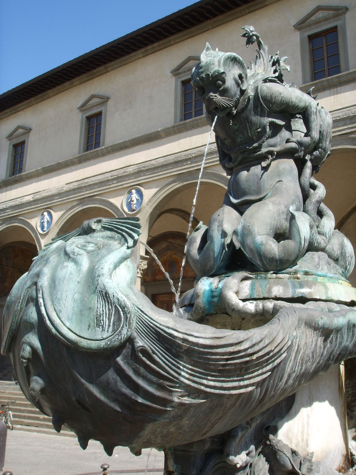 Prima fontana dei mostri marini